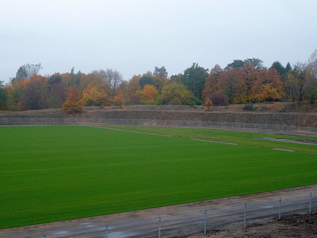 Przebudowa wielofunkcyjnego obiektu sportowego w Łodzi na Stokach. Stan: 16.10.2008 r.